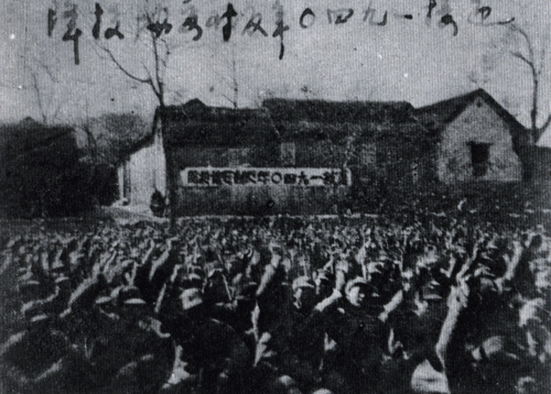 1940年，山东党政军在沂蒙根据地举行反对妥协投降大会